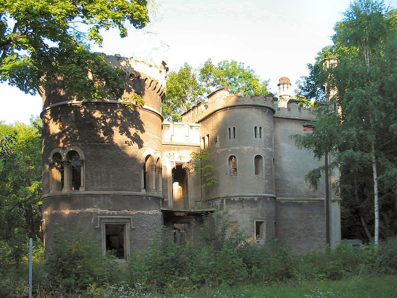 Bytom, Miechowice; ruins of the old castleBytom Miechowice. Ruina pałac wybudowanego w latach 1812-1817.Rodzina von Tiele Winckler. Zdjęcie wykonano 27 sierpnia 2005. Autor: Dariusz Pojda.